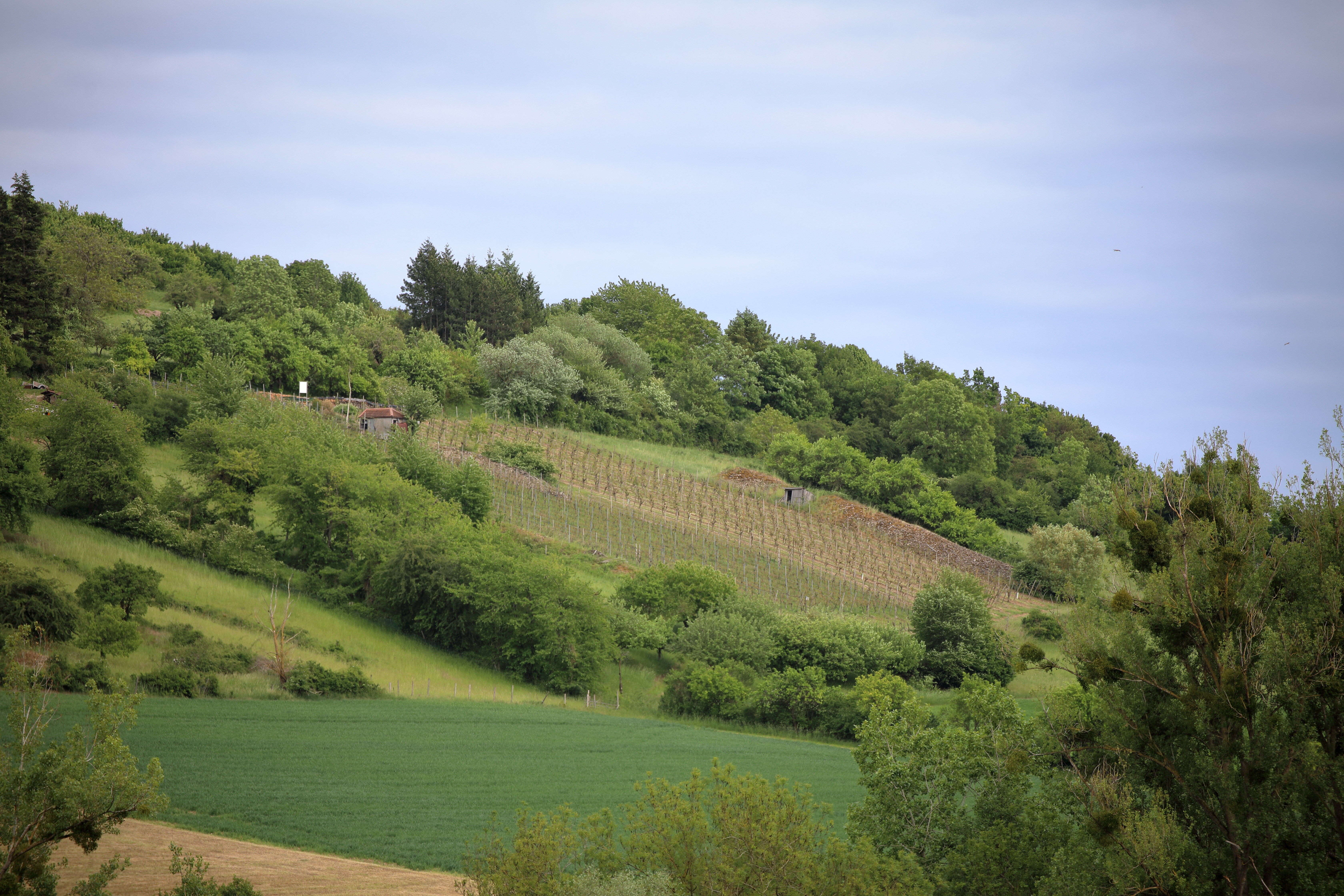 Der Weinberg im Gewann Ackerberg im Weikersheimer Ortsteil Laudenbach ist die älteste Lage der wiederentdeckten Rebsorte Tauberschwarz.